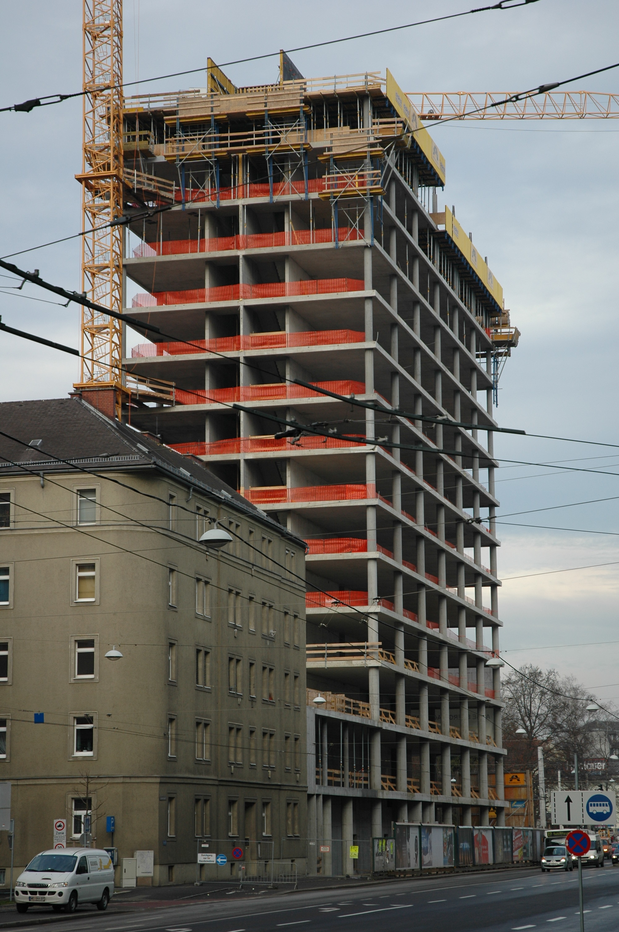 Neuer Firmensitz der Energie AG Oberösterreich in Linz, nahe dem Hauptbahnhof und direkt neben dem Landesdienstleistungszentrum. Das Gebäude wird bei Fertigstellung 73 Meter hoch sein und 19 Etagen aufweisen